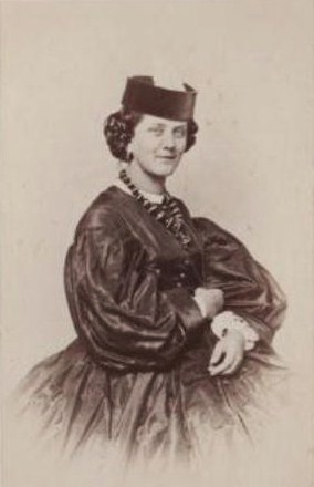 Княгиня Екатерина Петровна Голицына, ур. Валуева (1839—1916), с 1859 года супруга князя Александра Васильевича Голицына (1828—1869).